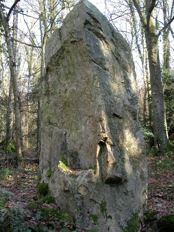 Menhir classé dit "La Roche Piquée" ou "La Roche Piquet" à proximité de (Saint-Germain-le-Vasson) (Calvados) - France